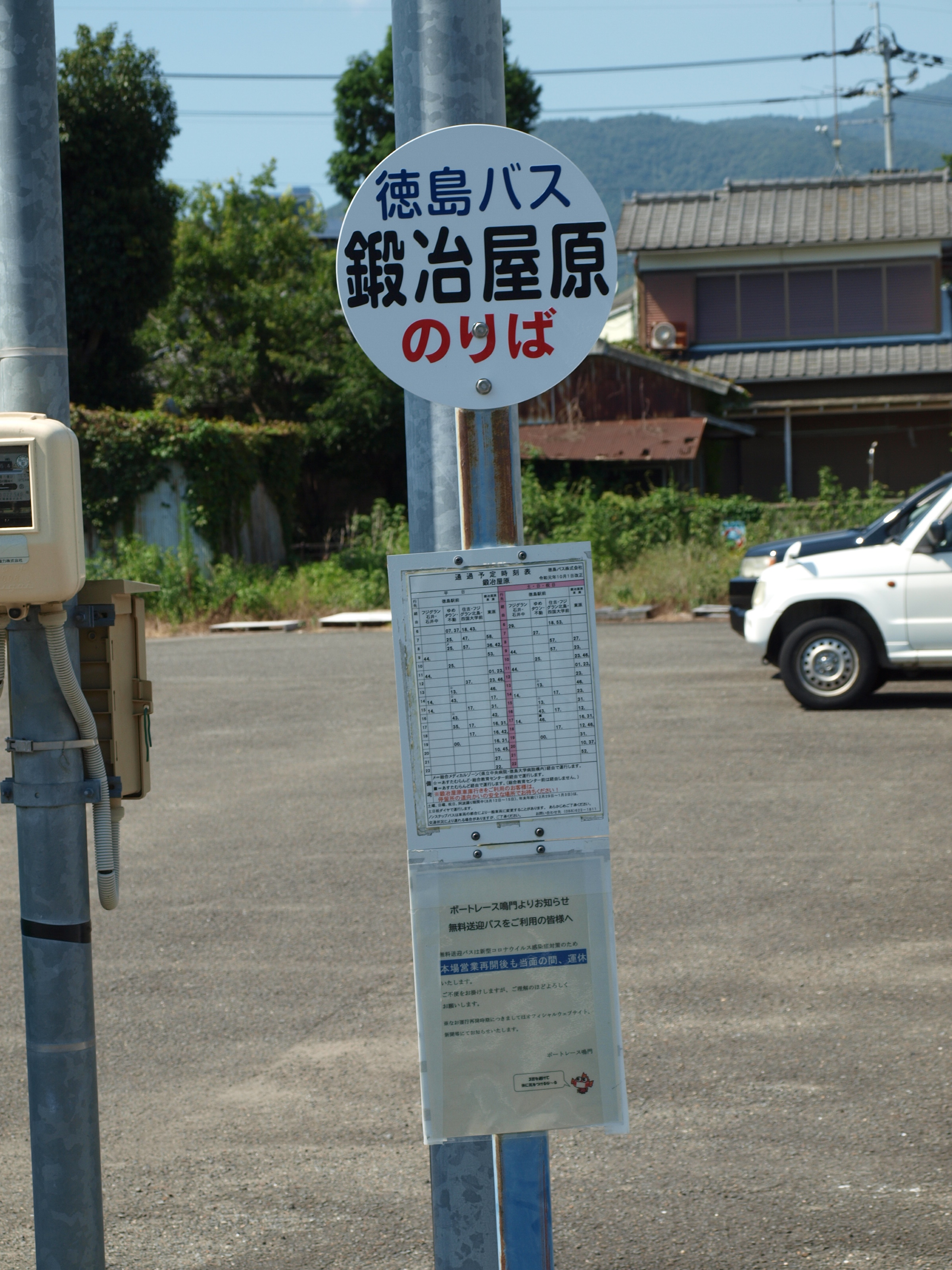 旧鍛冶屋原駅前のバス停表示